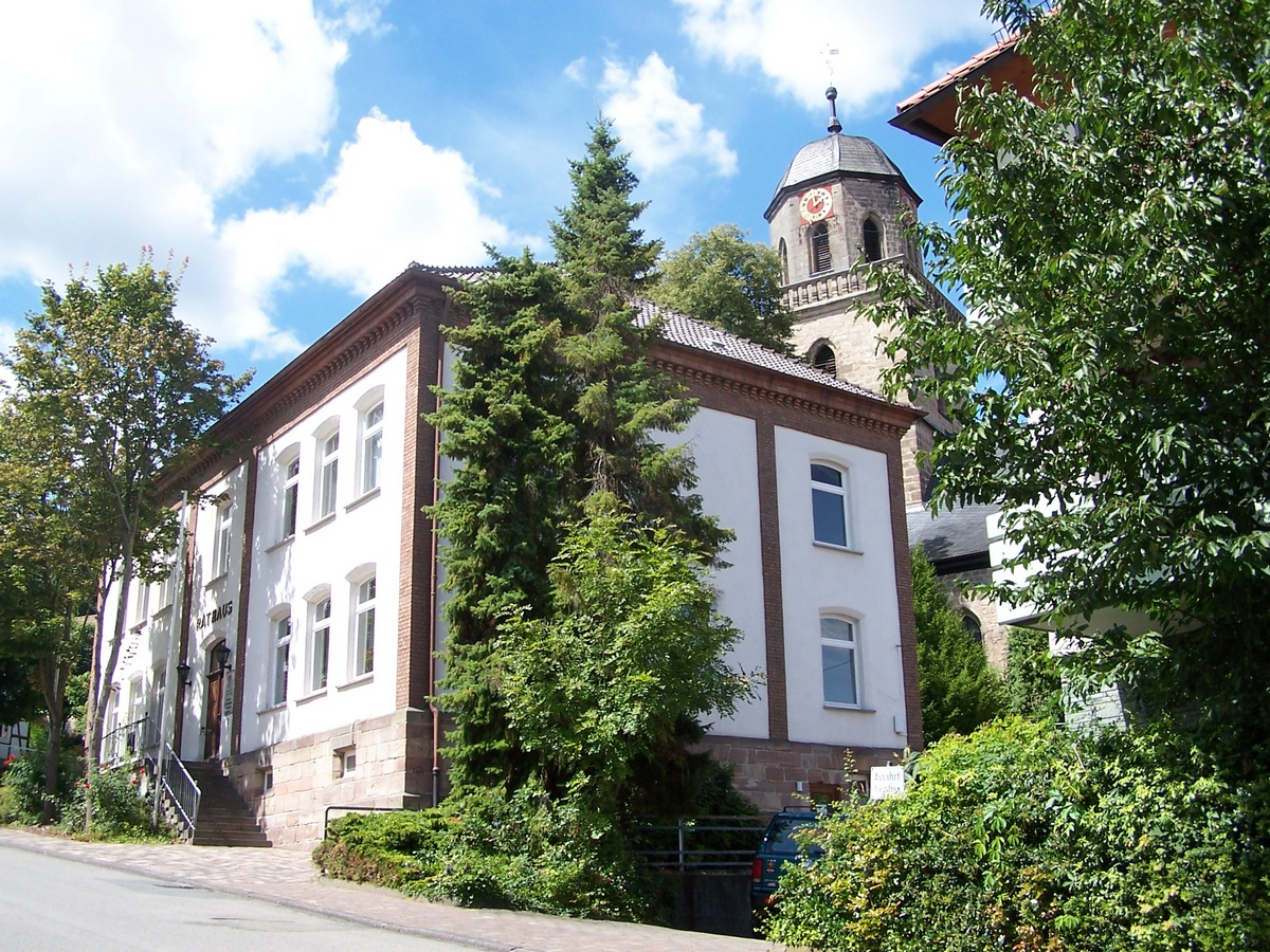 Rhoden (Diemelstadt), Rathaus und Evangelische Kirche